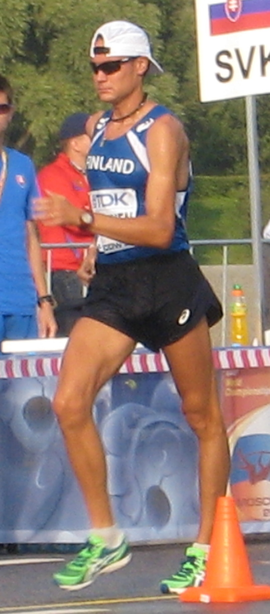 Чемпионат мира по лёгкой атлетике 2013. Ходьба 50 км, мужчины. Пелотон